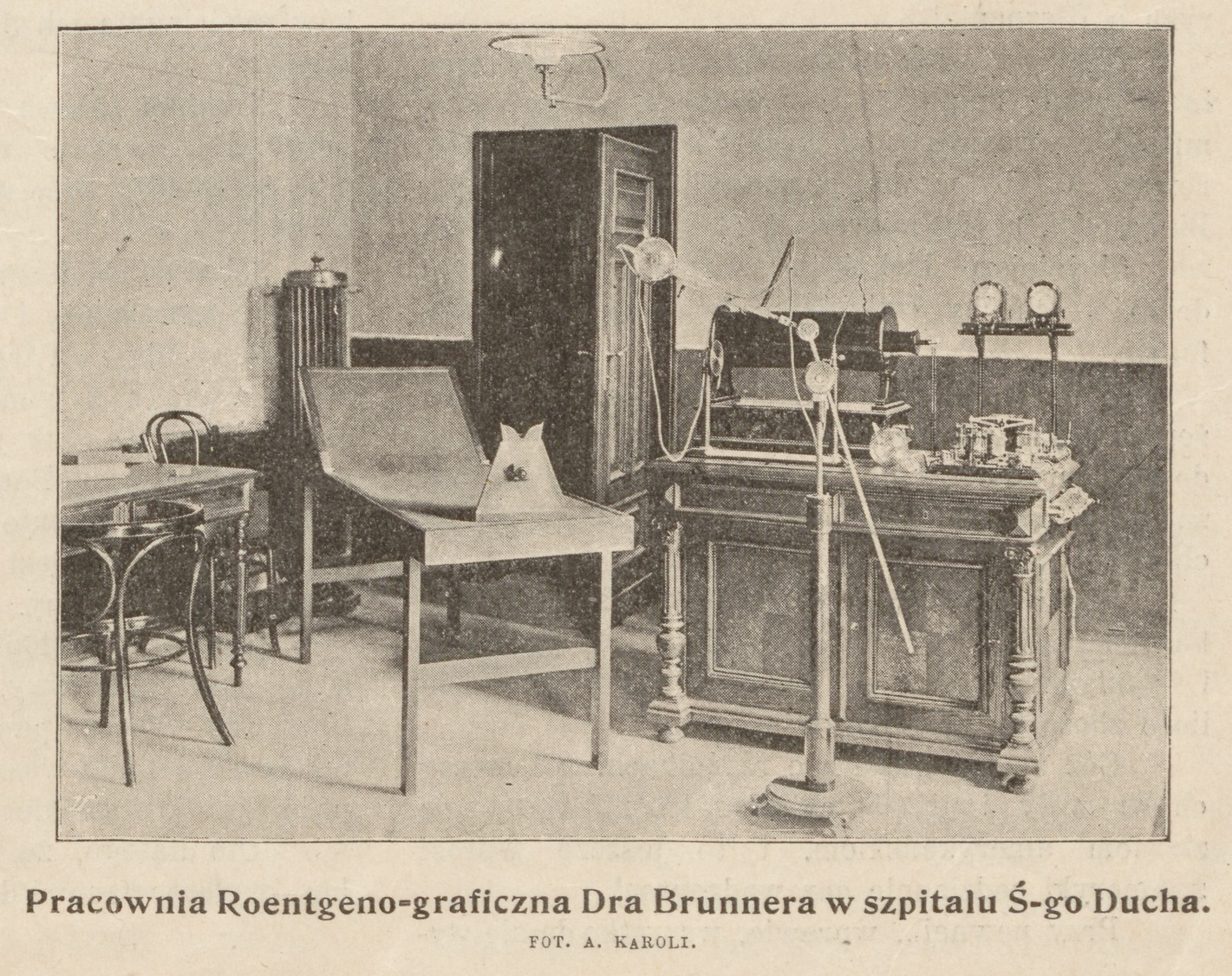 Pracownia Roentgeno-graficzna Dra Brunnera w szpitalu Ś-go Ducha: Fot. A. Karoli